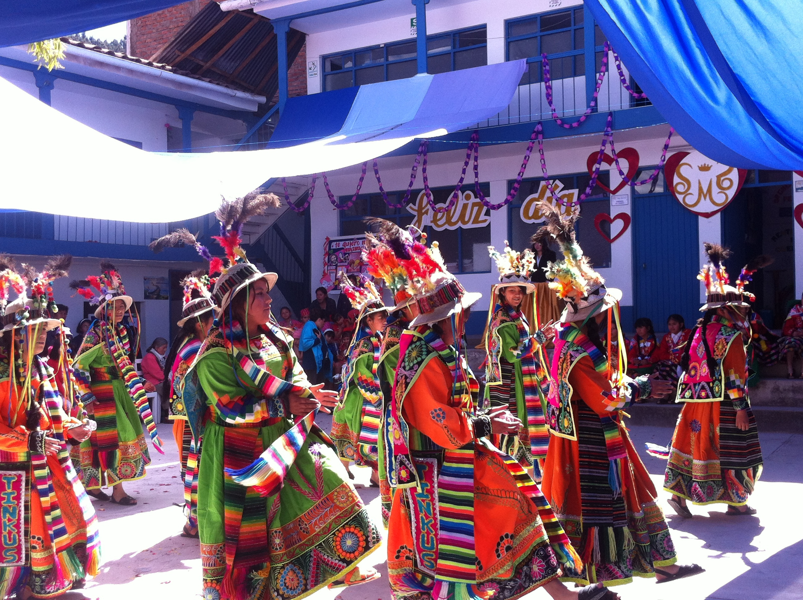 Peru - Cusco 105 - school traditional dance festival